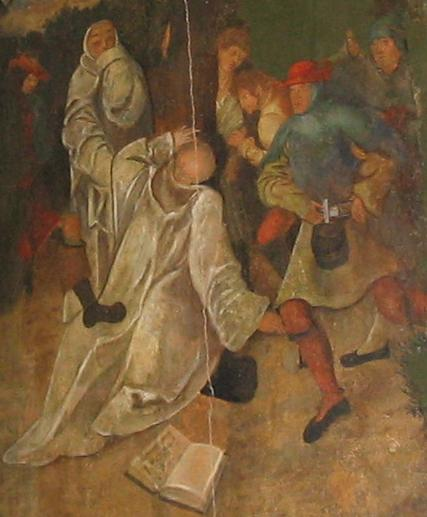 Lehnin, Bildausschnitt Erschlagung Sibolds Ausschnitt aus einem Gemälde aus dem ersten Viertel des 16. Jahrhunderts, das die Ermordung des ersten Klosterabtes Sibolds thematisiert. Die schematische Abbildung zeigt die Nordansicht der unfertigen Klosterkirche, wie sie sich um 1185/1190 tatsächlich dargestellt haben könnte. Das Bild hängt heute in der Klosterkirche.